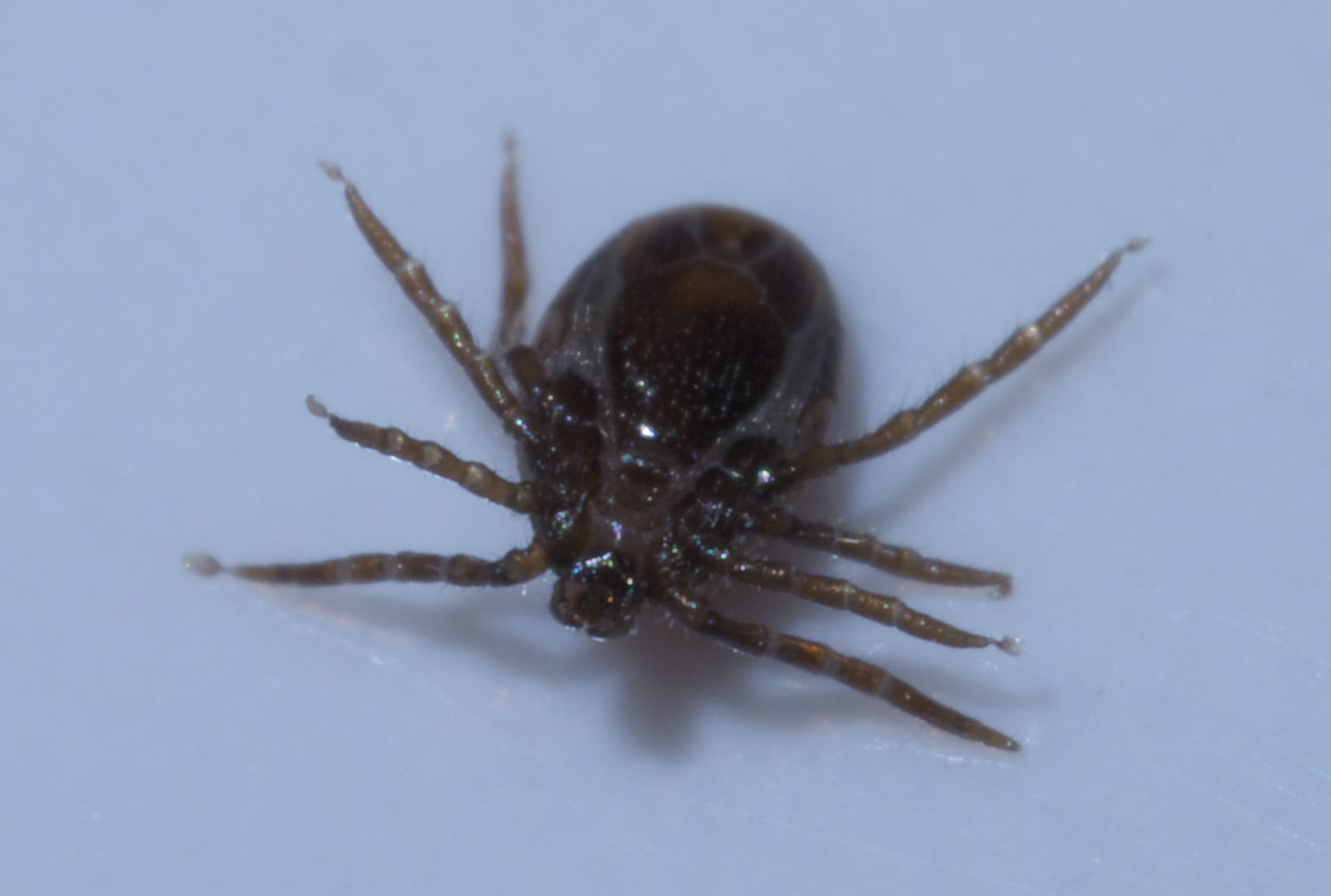 Ixodida, ticks